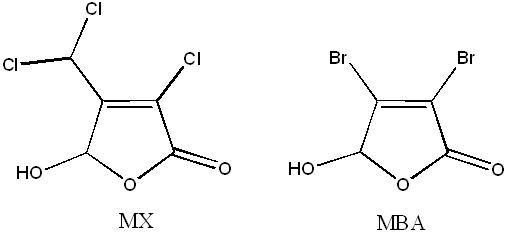 Etalon interne pour l'analyse GCMS du Mutagen X